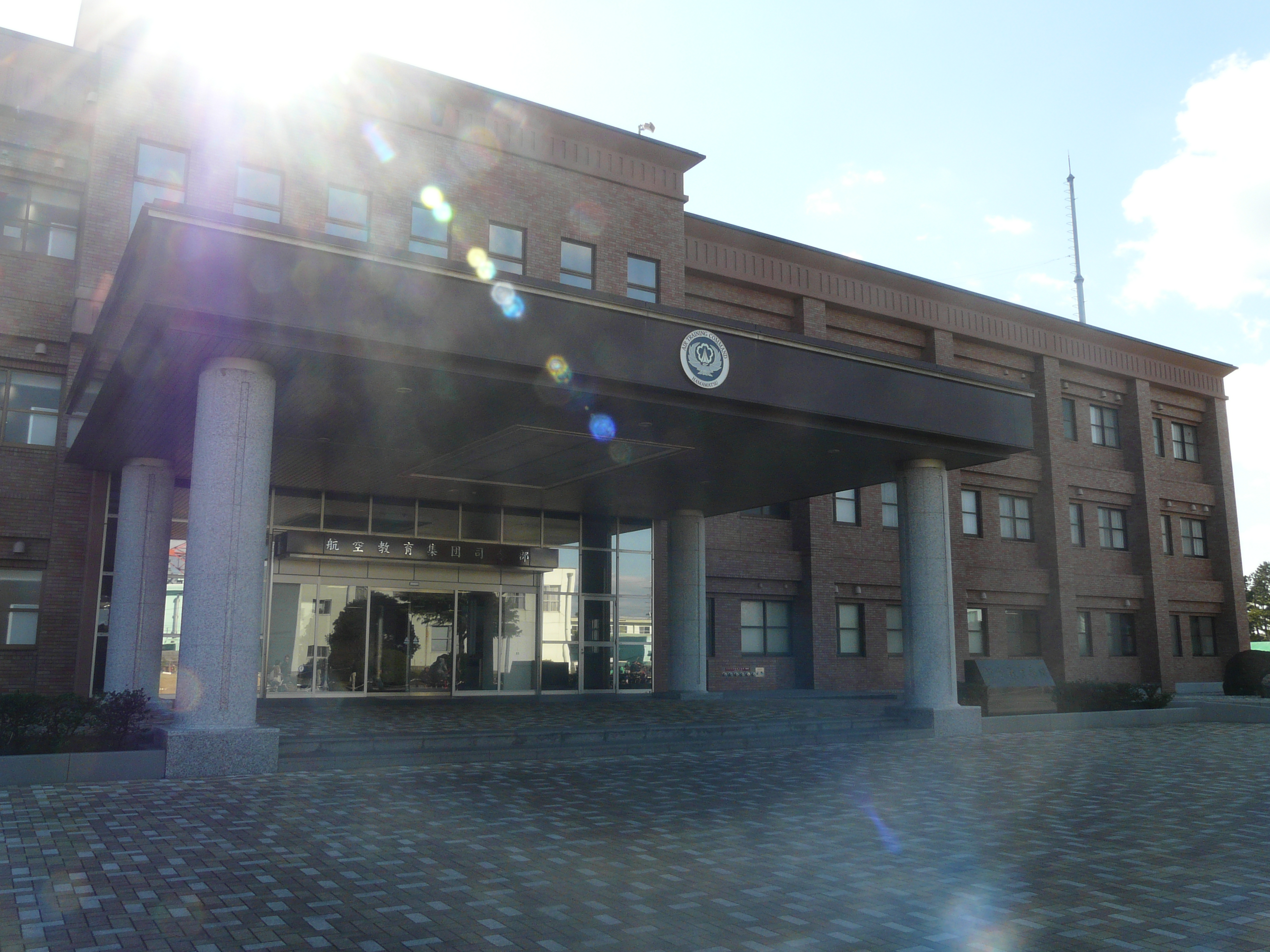 浜松基地の航空教育集団司令部 航空祭（2012年11月18日）にて撮影